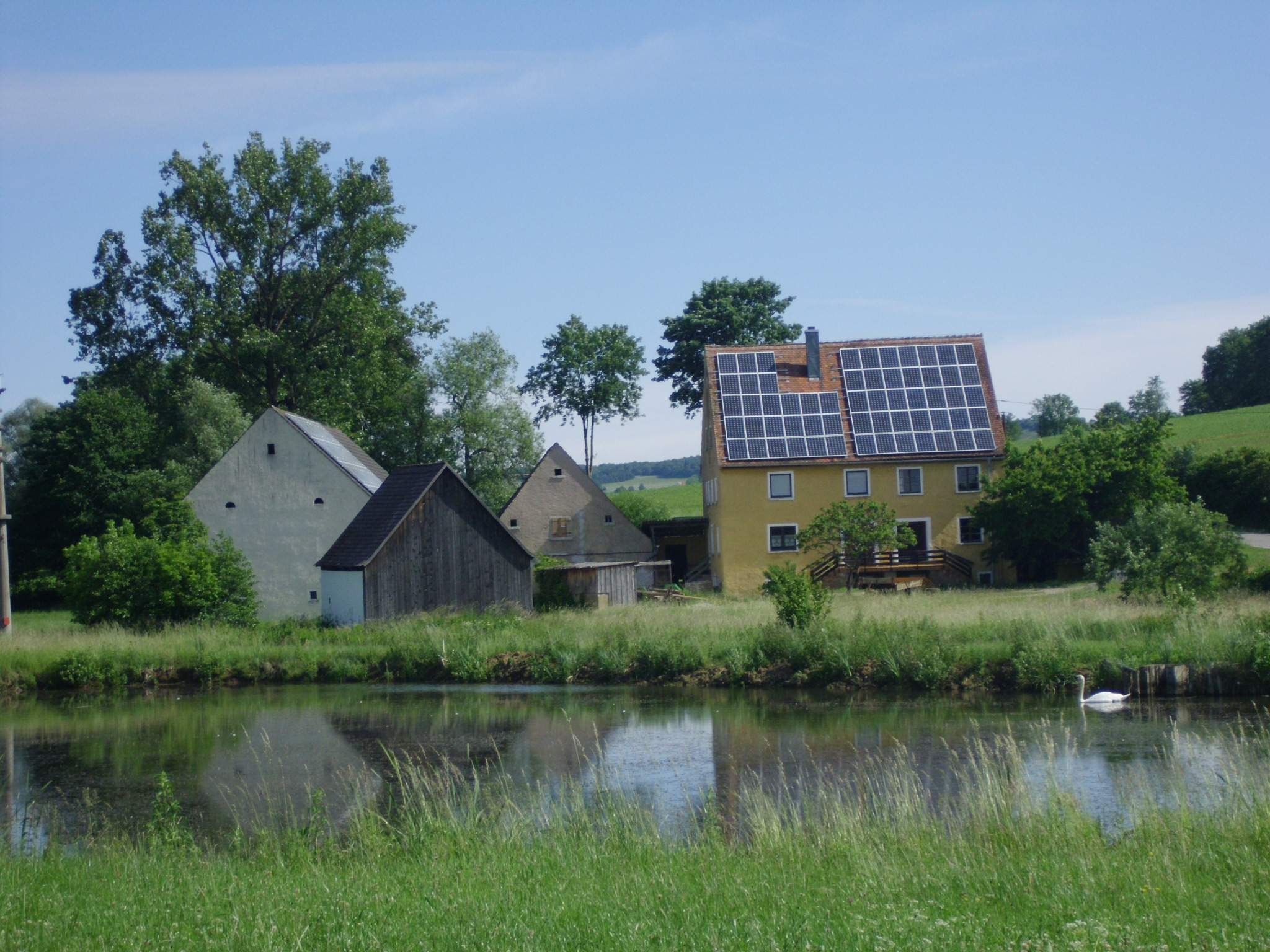 Die Scheckenmühle, Ortsteil des Marktes Heidenheim im mittelfränkischen Landkreis Weißenburg-Gunzenhausen